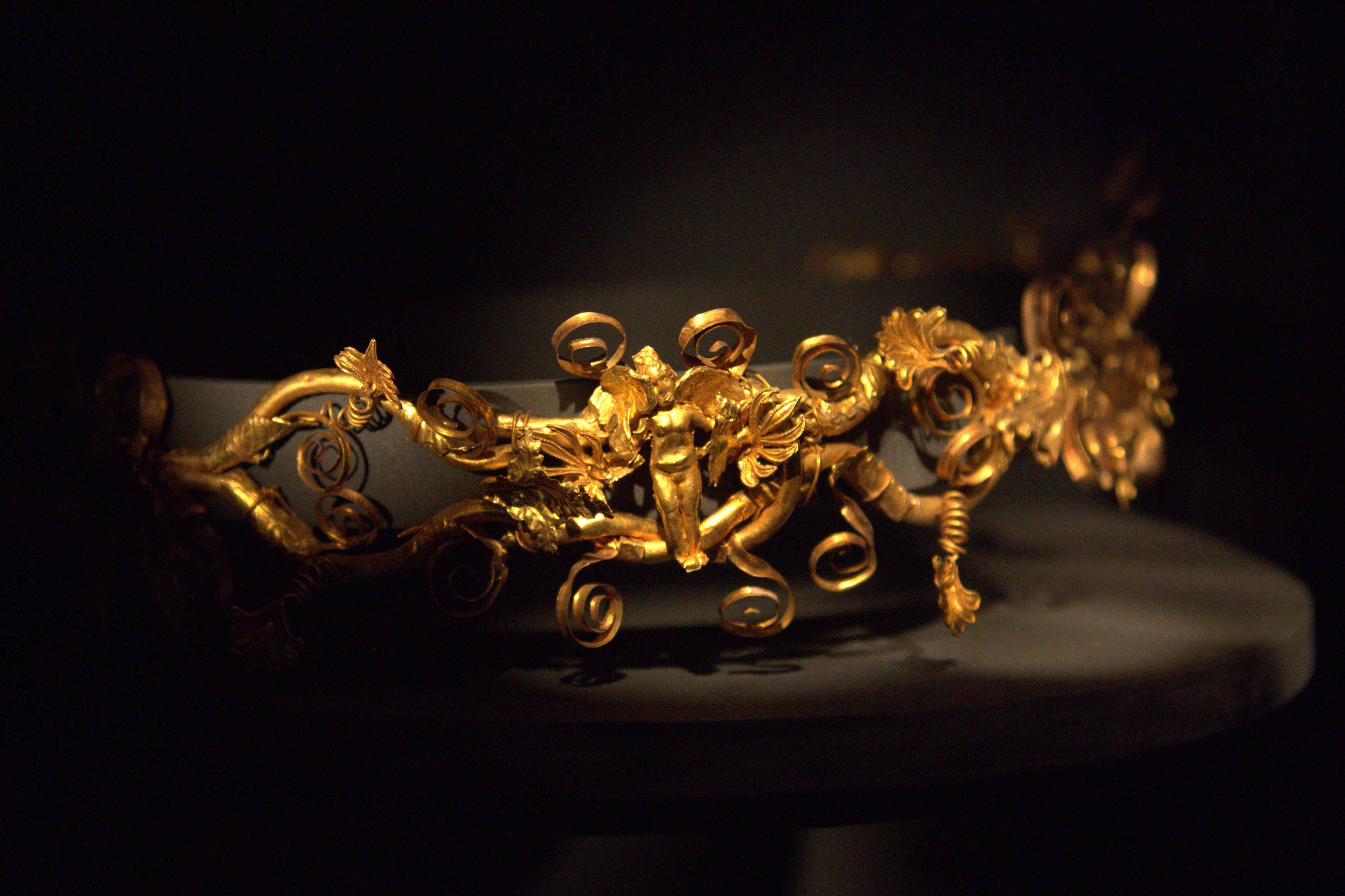 At the center a "knot of Heracules" on which is a winged Eros holding doves in his hands. Grave good from tombs at Sedes. 320-300 BC. Archaeological Museum of Thessaloniki, Greece. --- Χρυσό διάδημα που αποτελείται από οκτώ λυρόσχημα τμήματα που διακοσμούνται με φύλλα άκανθας, έλικες και ανθέμια. Στο κέντρο σχηματίζεται "κόμβος του Ηρακλή" όπου παρά φτερωτός Έρωτας με περιστέρια στα χέρια. Αρχαιολογικό Μουσείο Θεσσαλονίκης.